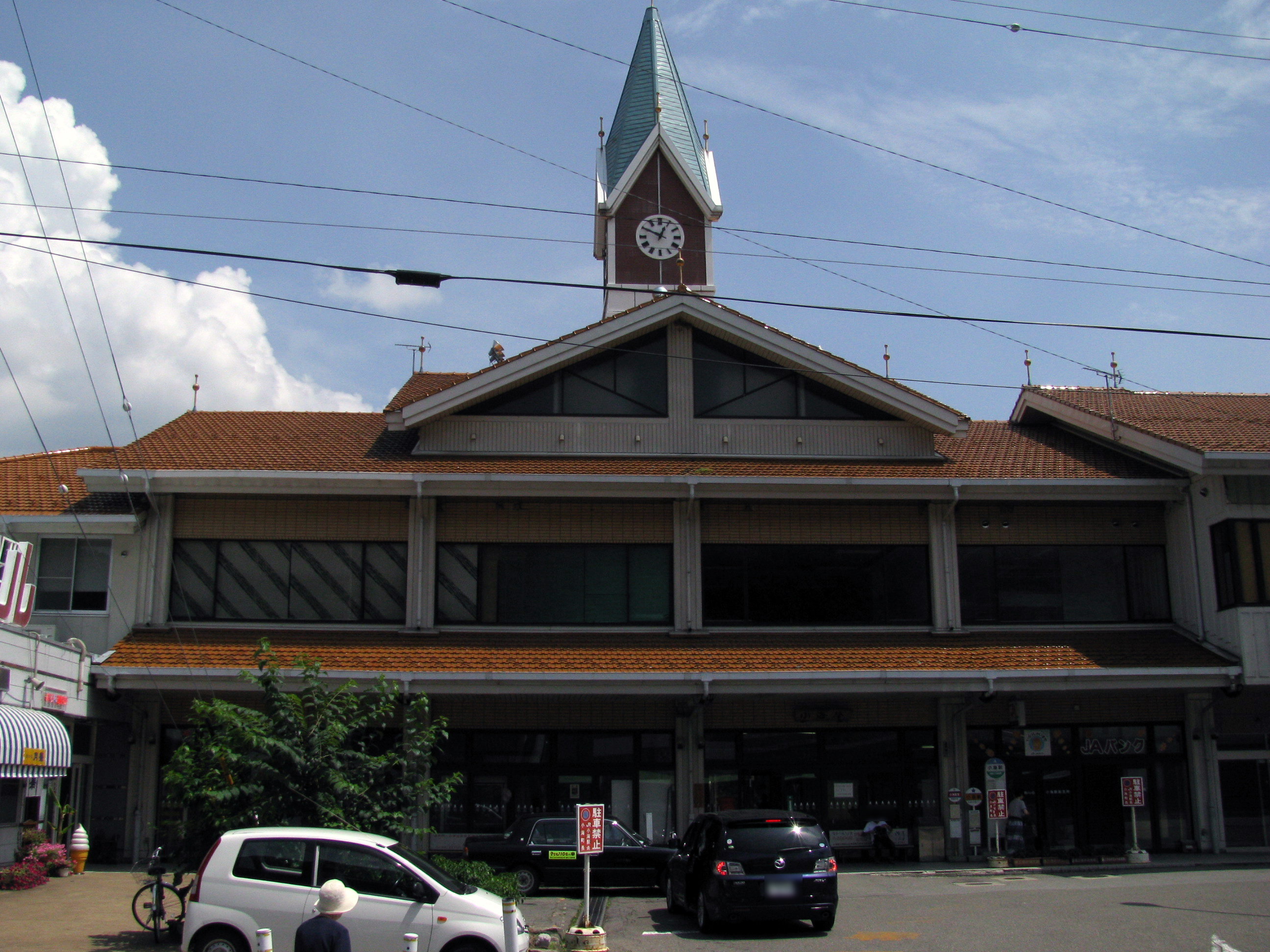 東日本旅客鉄道小海線小海駅